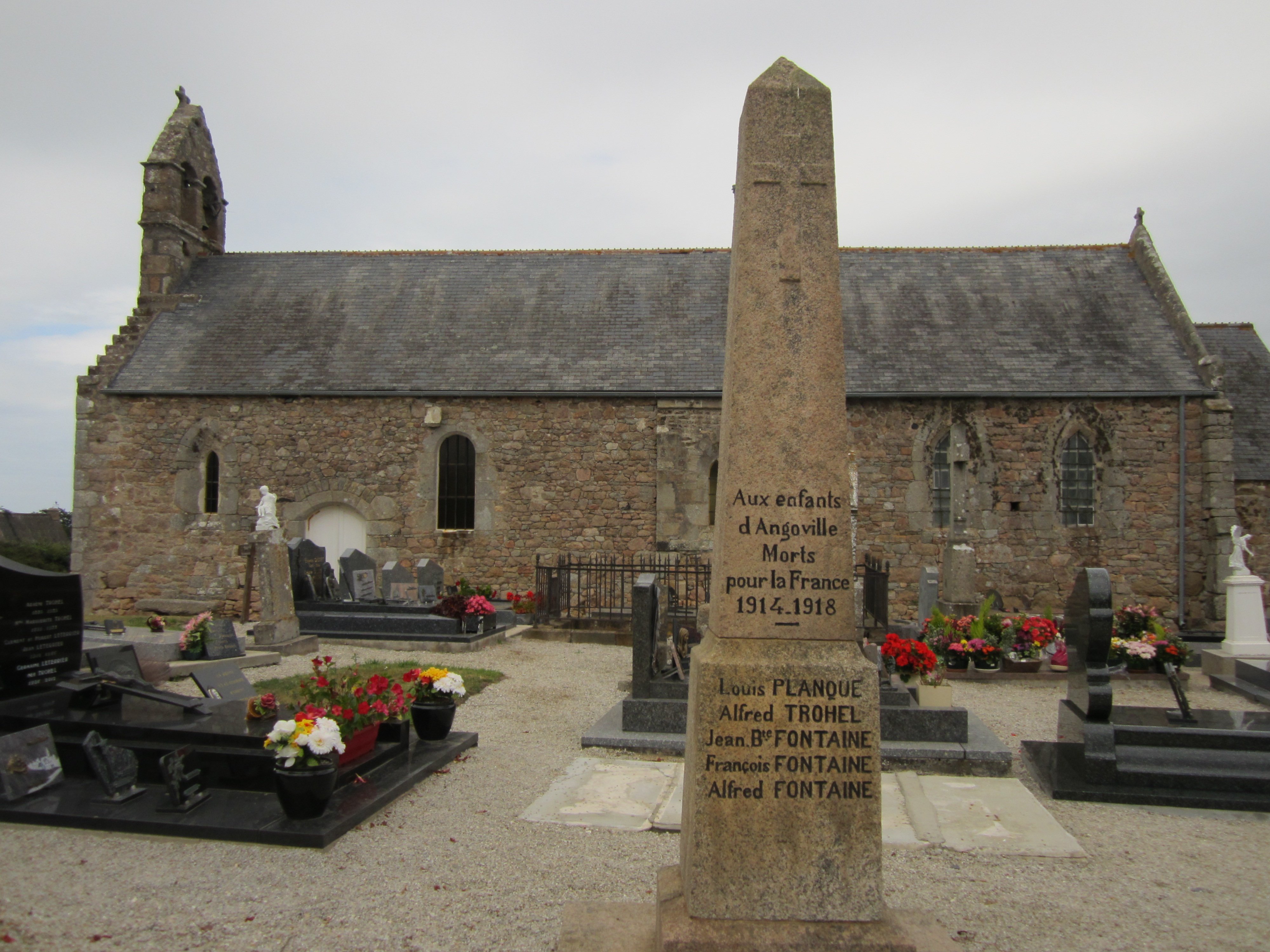 Angoville-en-Saire, commune associé de Cosqueville, Manche